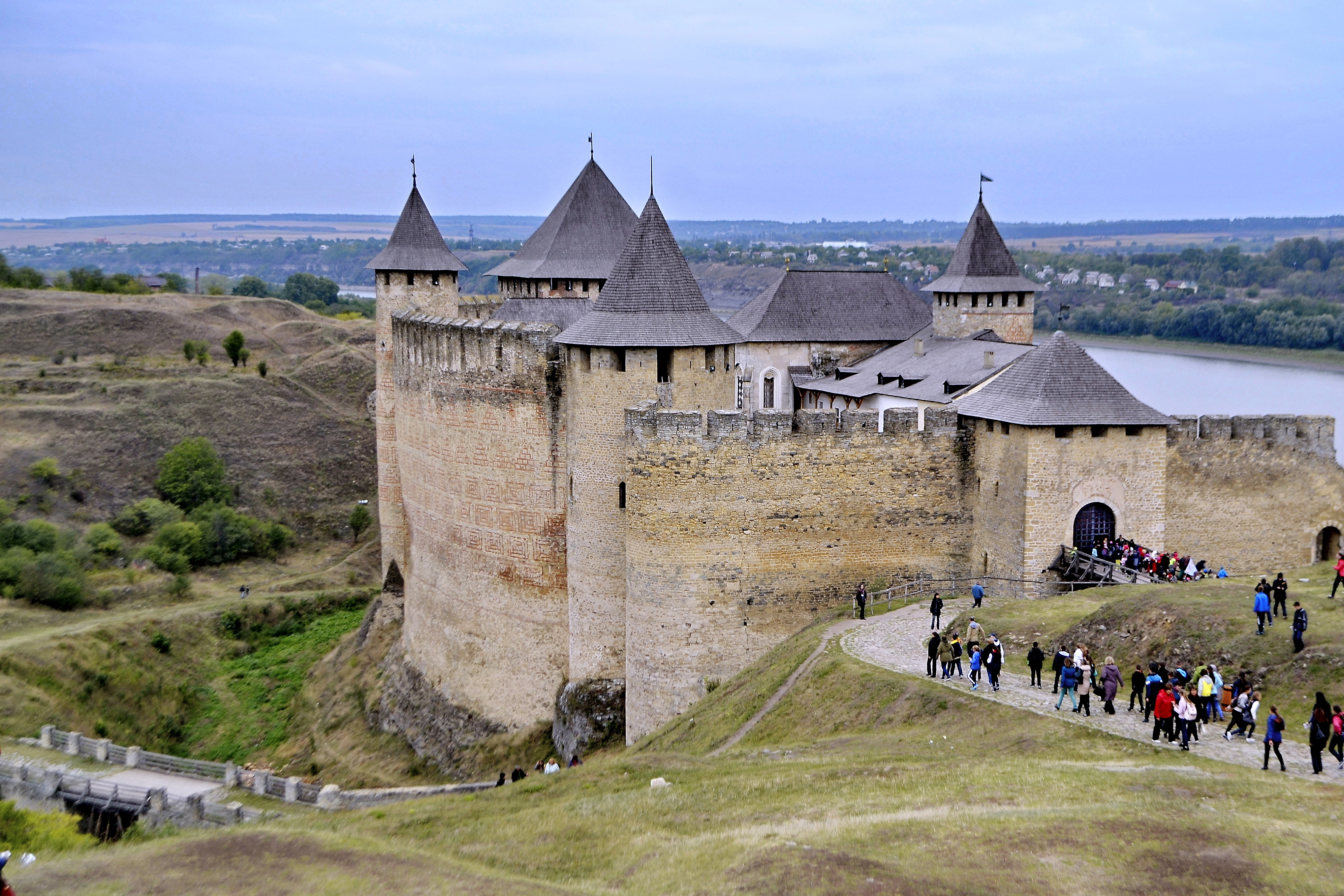 Хотинська фортеця, м. Хотин, Державний історико-архітектурний заповідник «Хотинська фортеця»